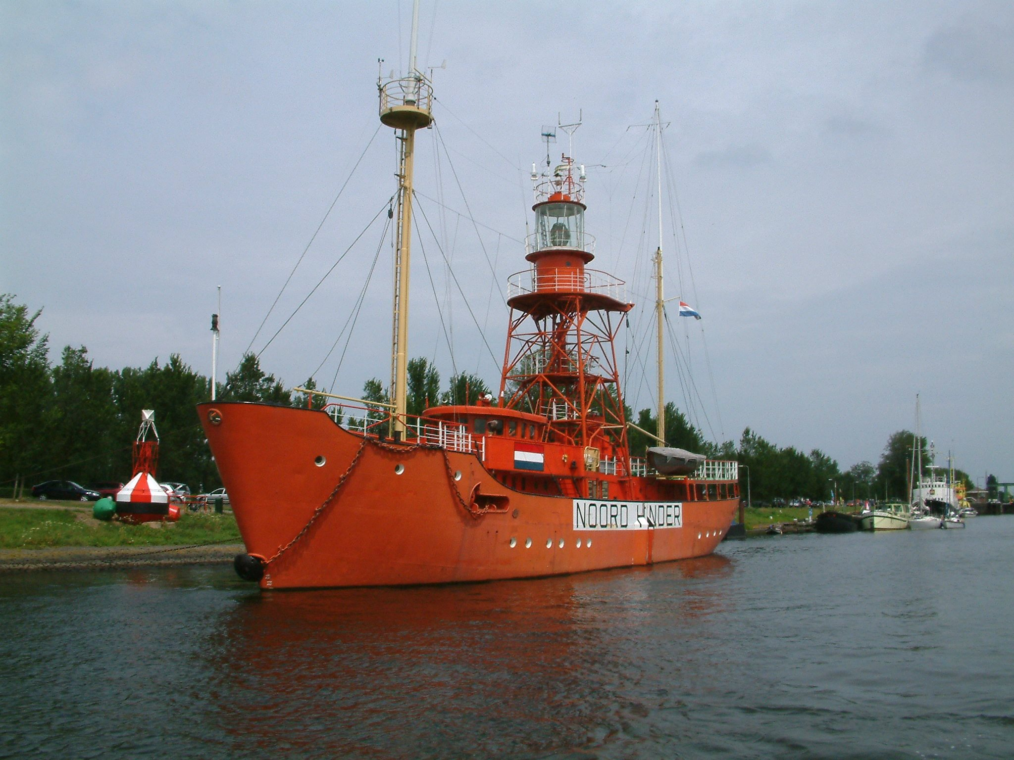 De NOORD HINDER voor de wal in Hellevoetsluis.